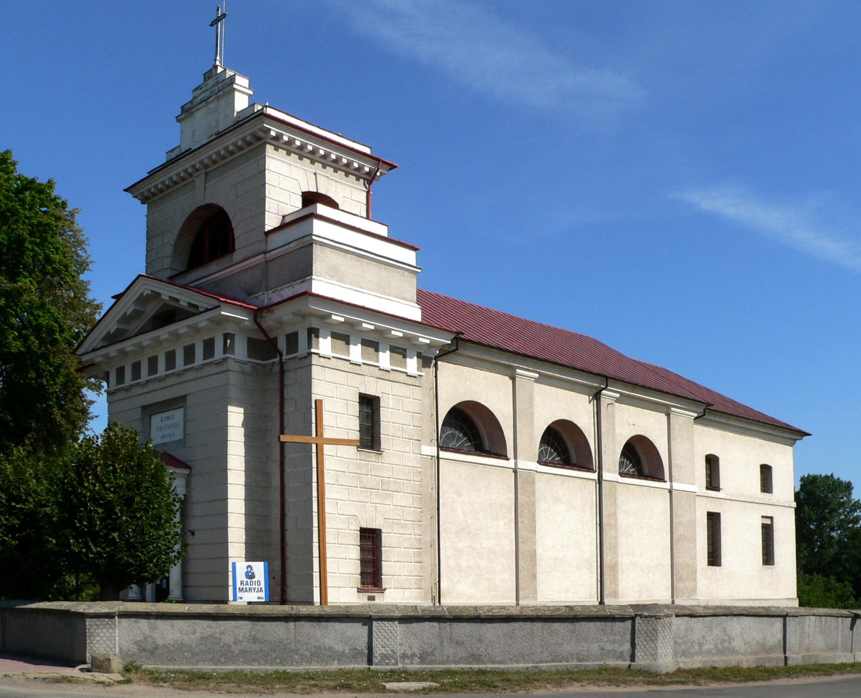 Description: Classicistic St. Dorothy parish church in the village of Petrykozy, Opoczno county, Poland Opis: Klasycystyczny kościół pw. św. Doroty w Petrykozach (powiat opoczyński) Source: picture taken and uploaded by Marek K. Misztal in September, 2005